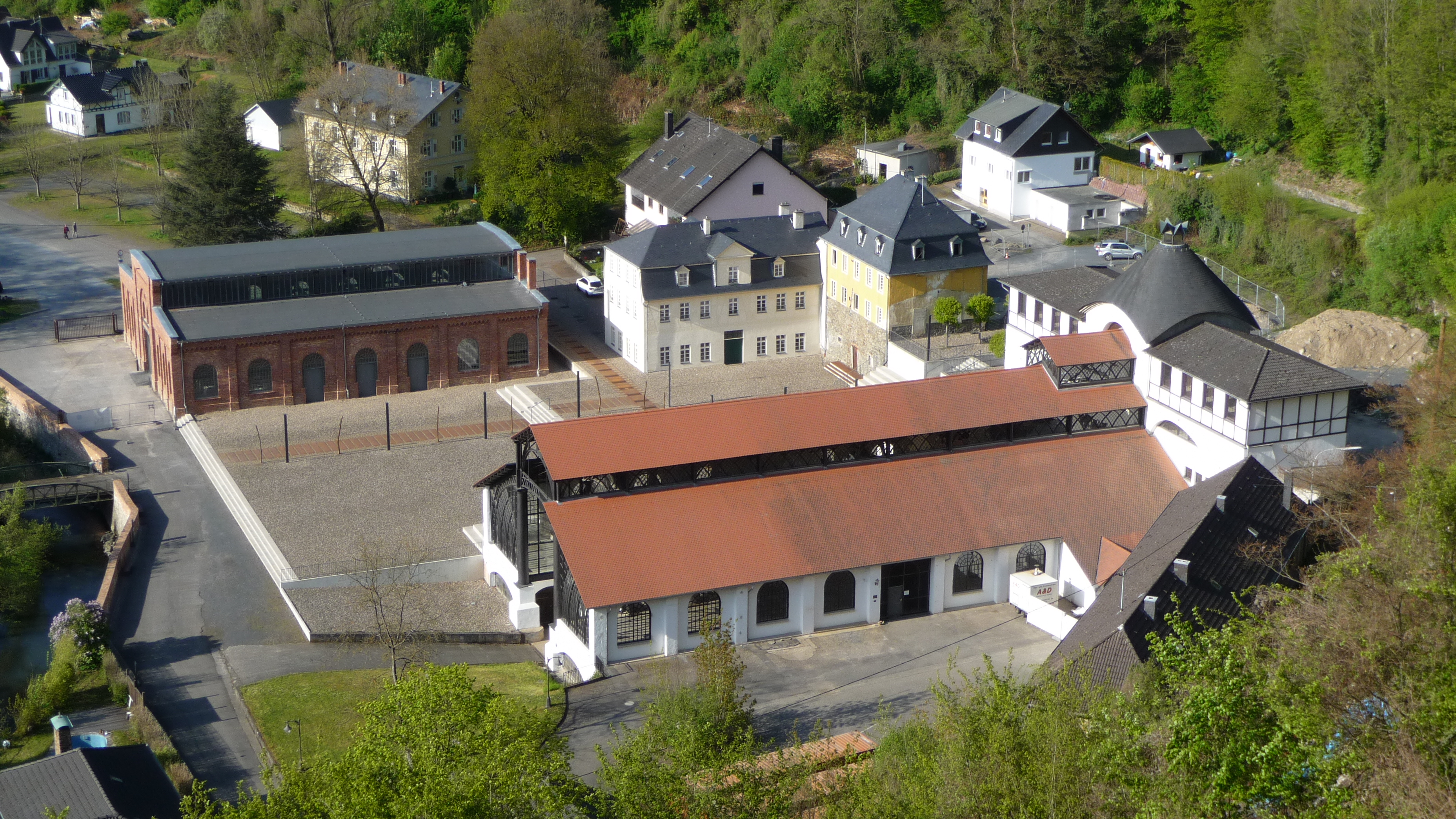 Bendorf-Sayn: Denkmalareal Sayner Hütte